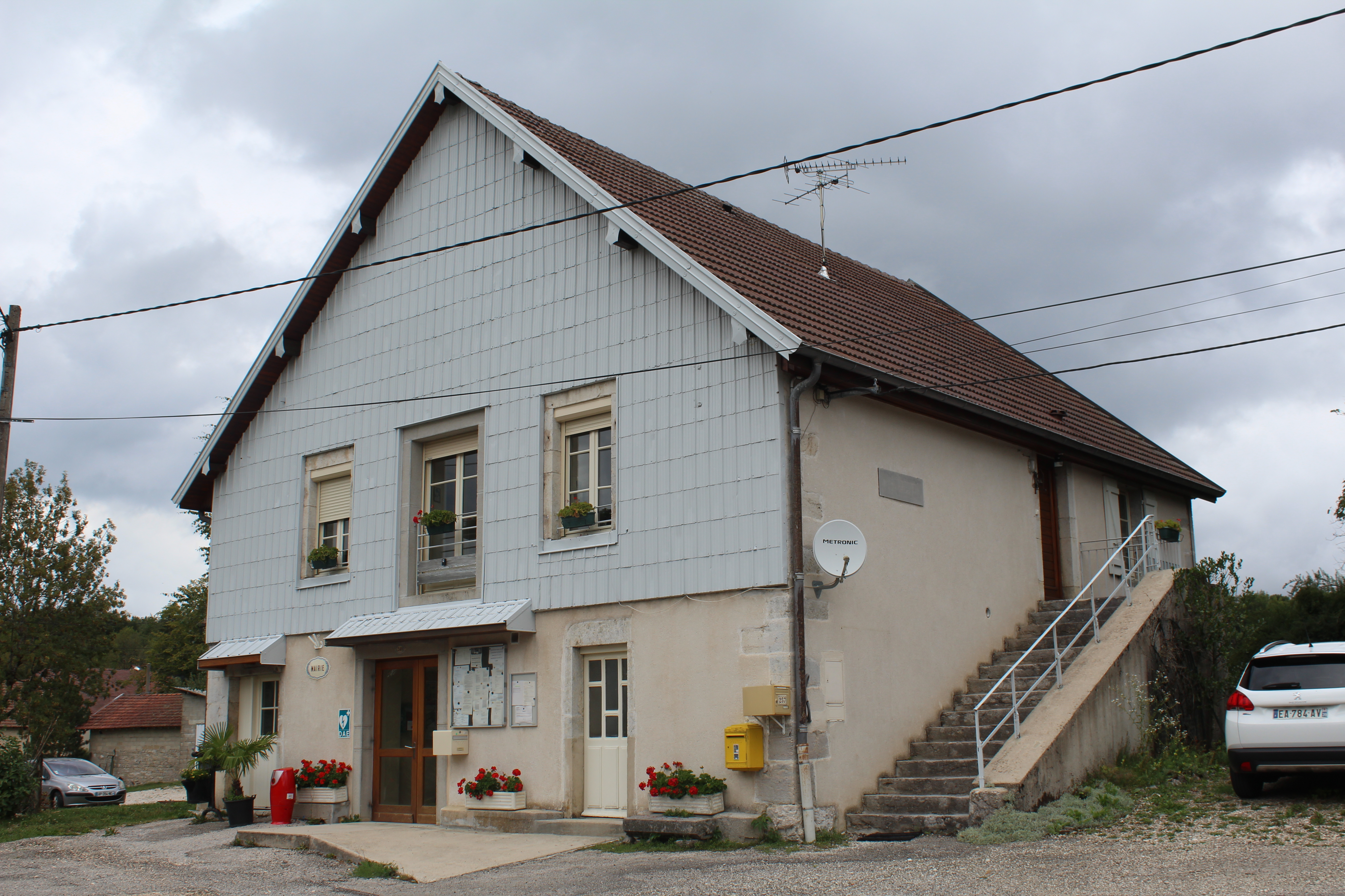 Mairie de Chevrotaine.